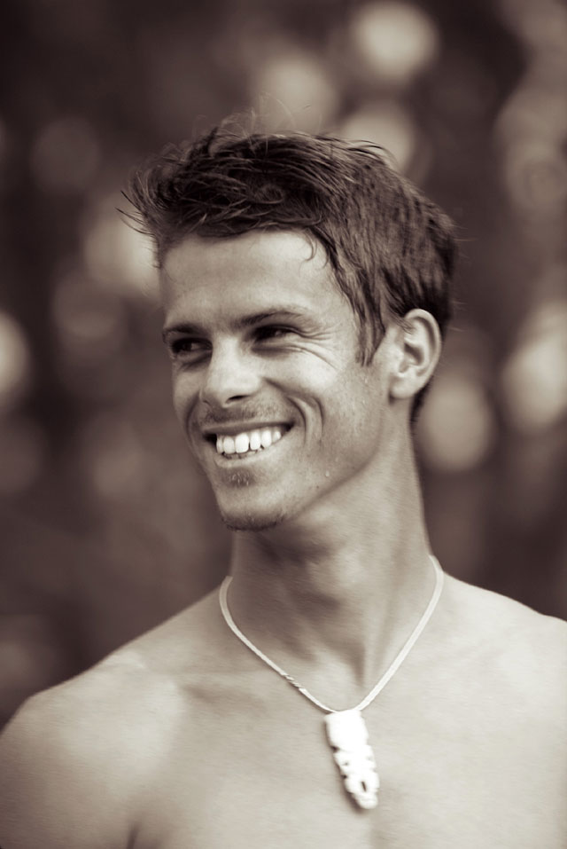 Photo hommage surf session